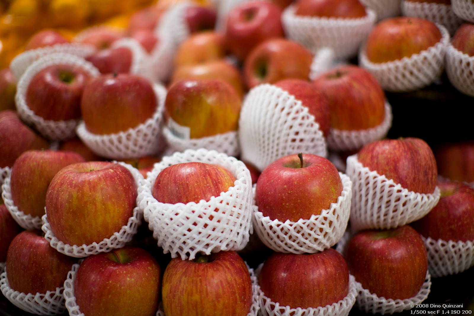 Io non so. Non mi pare possibile che un popolo imballi così le robe da mangiare... Tutte foto a mano libera in interno, con il 50mm